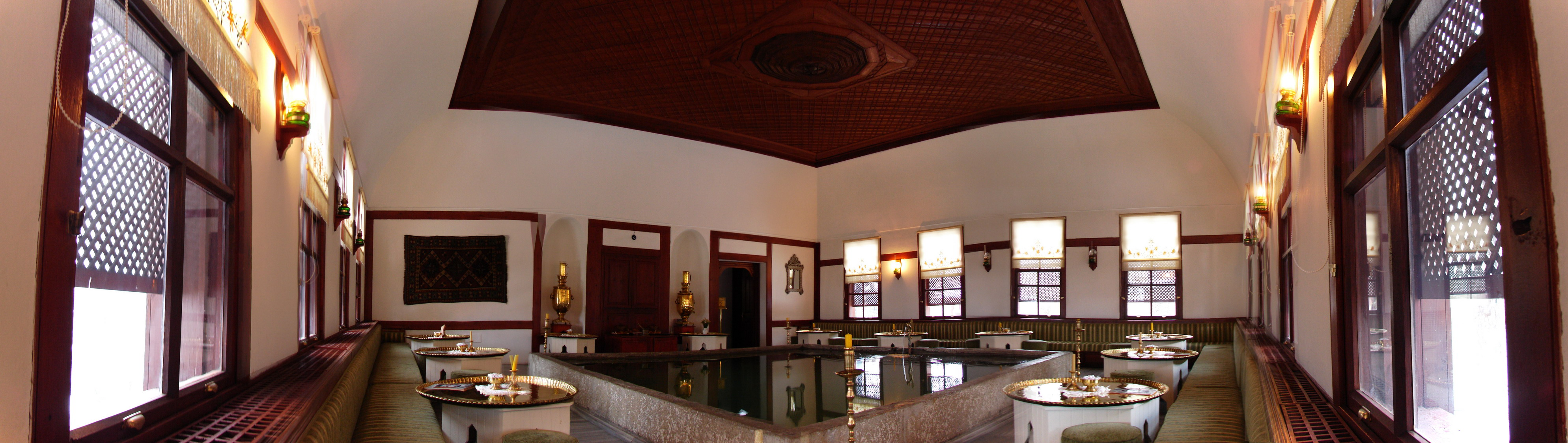 Safranbolu Asmazlar Konağı 41°14′55.7″N 32°41′33.7″E / 41.248806°N 32.692694°E